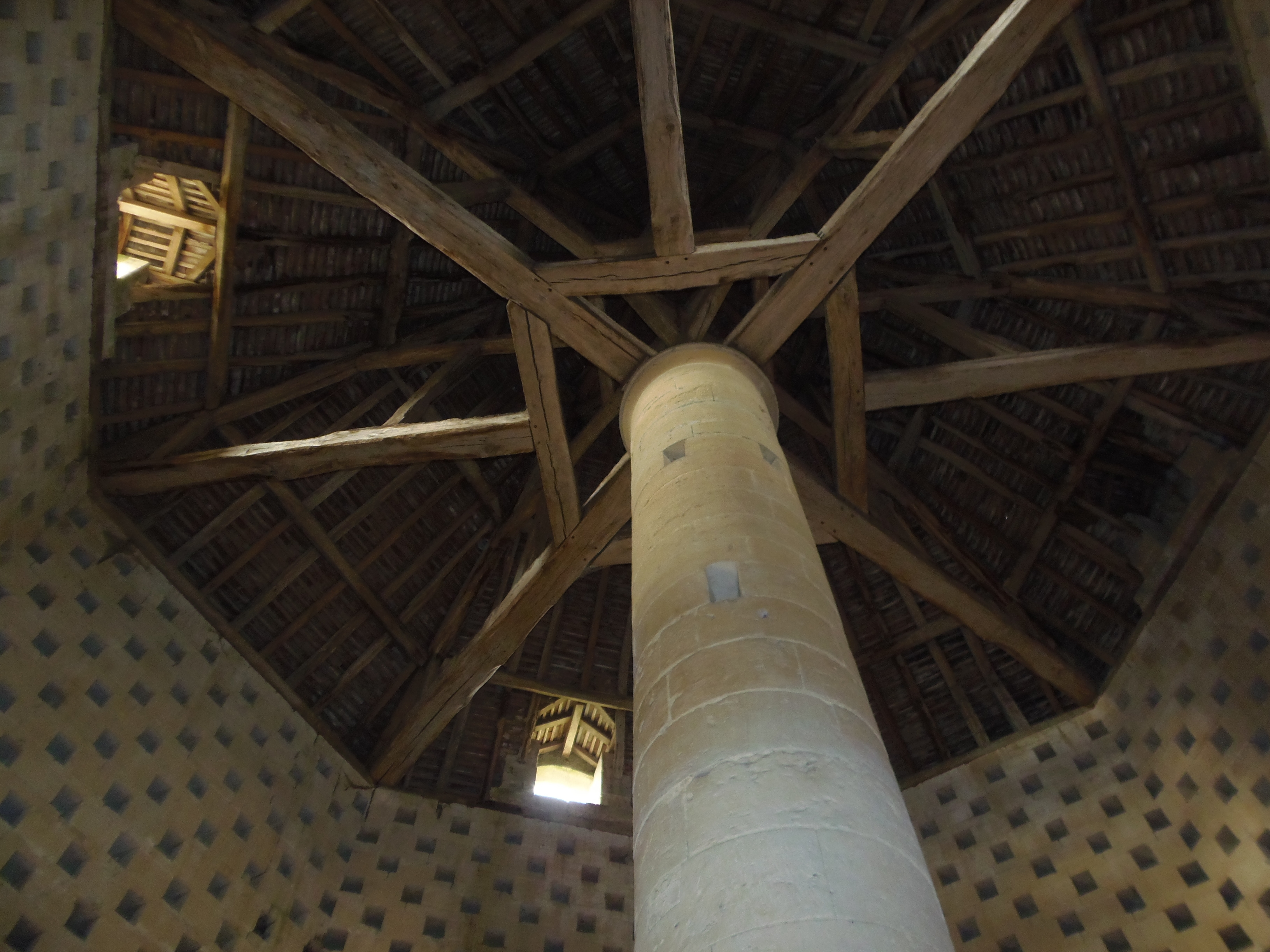 Saint-Pierre-sur-Dives (Normandie, France). Vue intérieure du pigeonnier du château de Carel.